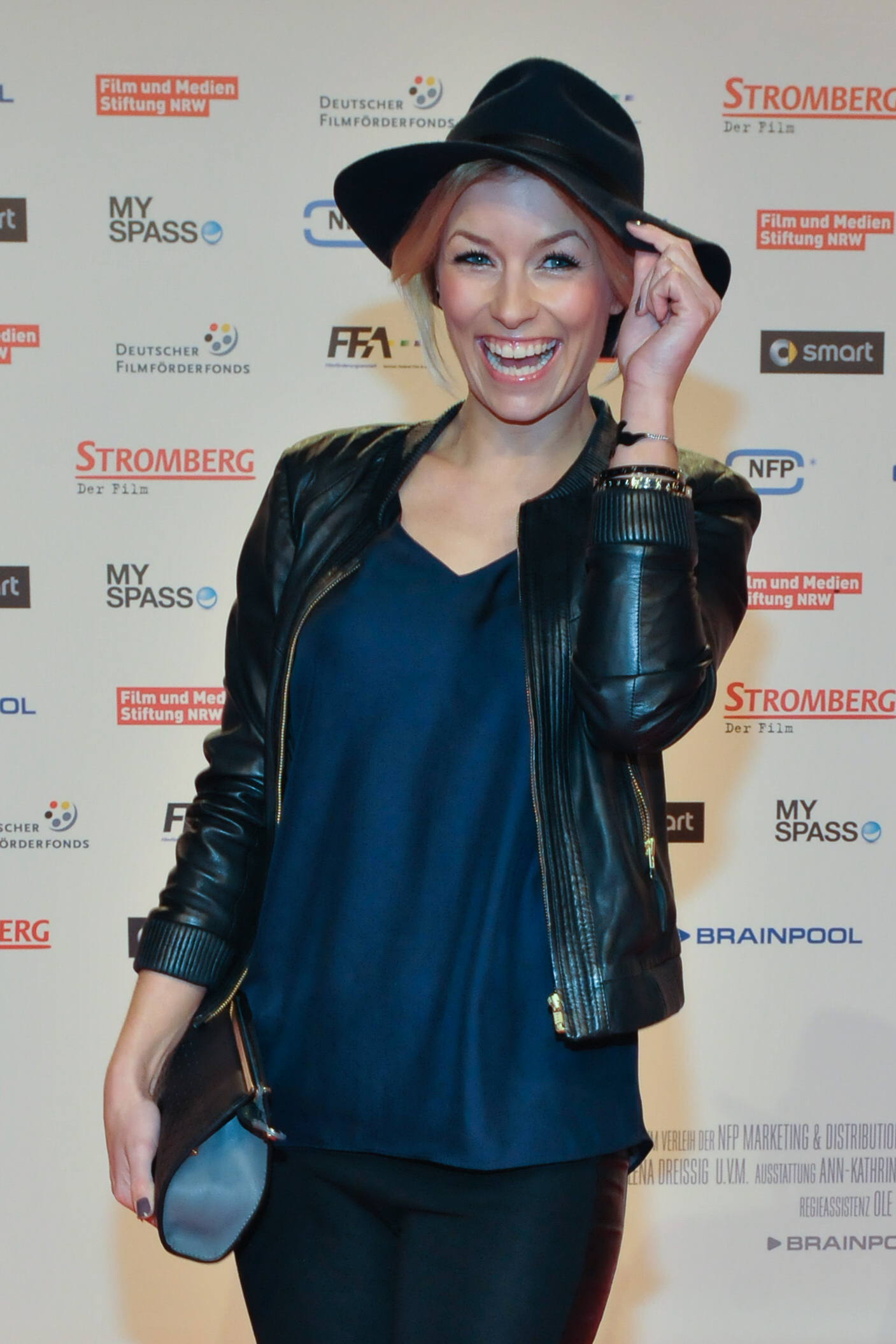 Annica Hansen auf der Premiere von "Stromberg - Der Film" in Köln am 18. Februar 2014.